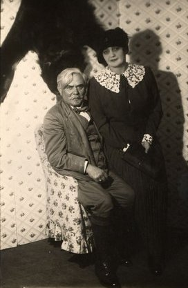 Bónyi Adorján: Édes ellenség. Társulat: Nemzeti Színház, Budapest. Bemutató: 1931.09.25. Rendező: Csathó Kálmán. Szereplők: Gedeon: Rózsahegyi Kálmán; Gedeonné: Gömöry Vilma.